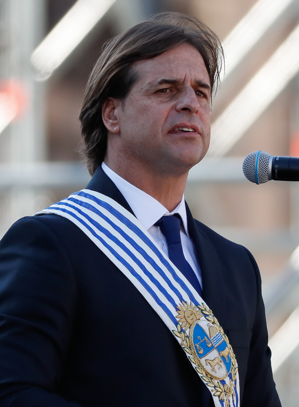 (Montevidéu - Uruguai, 01/03/2020) Palavras do Presidente eleito do Uruguai, Luis Lacalle Pou. Foto: Alan Santos/PR